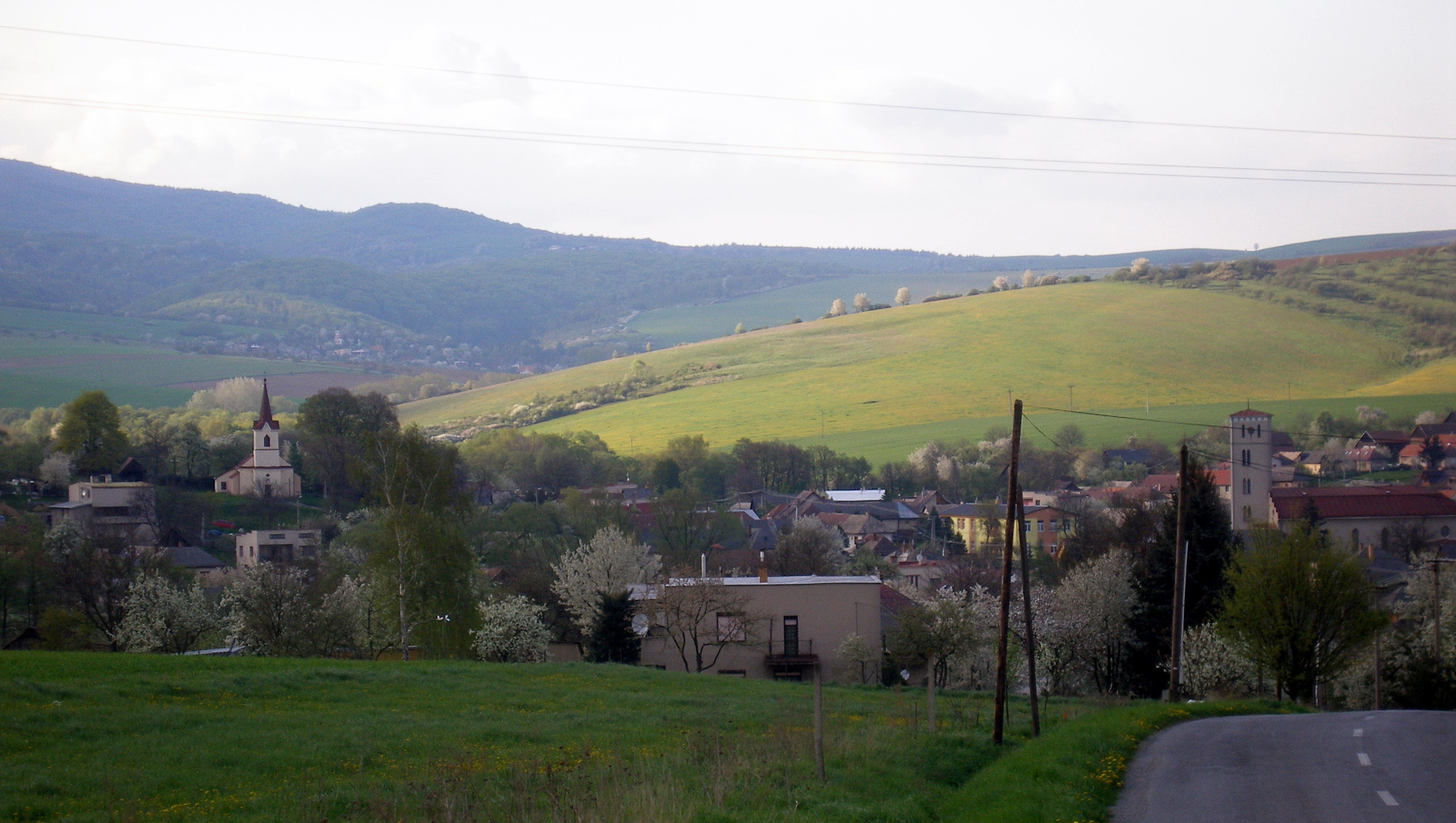 Obec Záhradné okres Prešov región Šariš